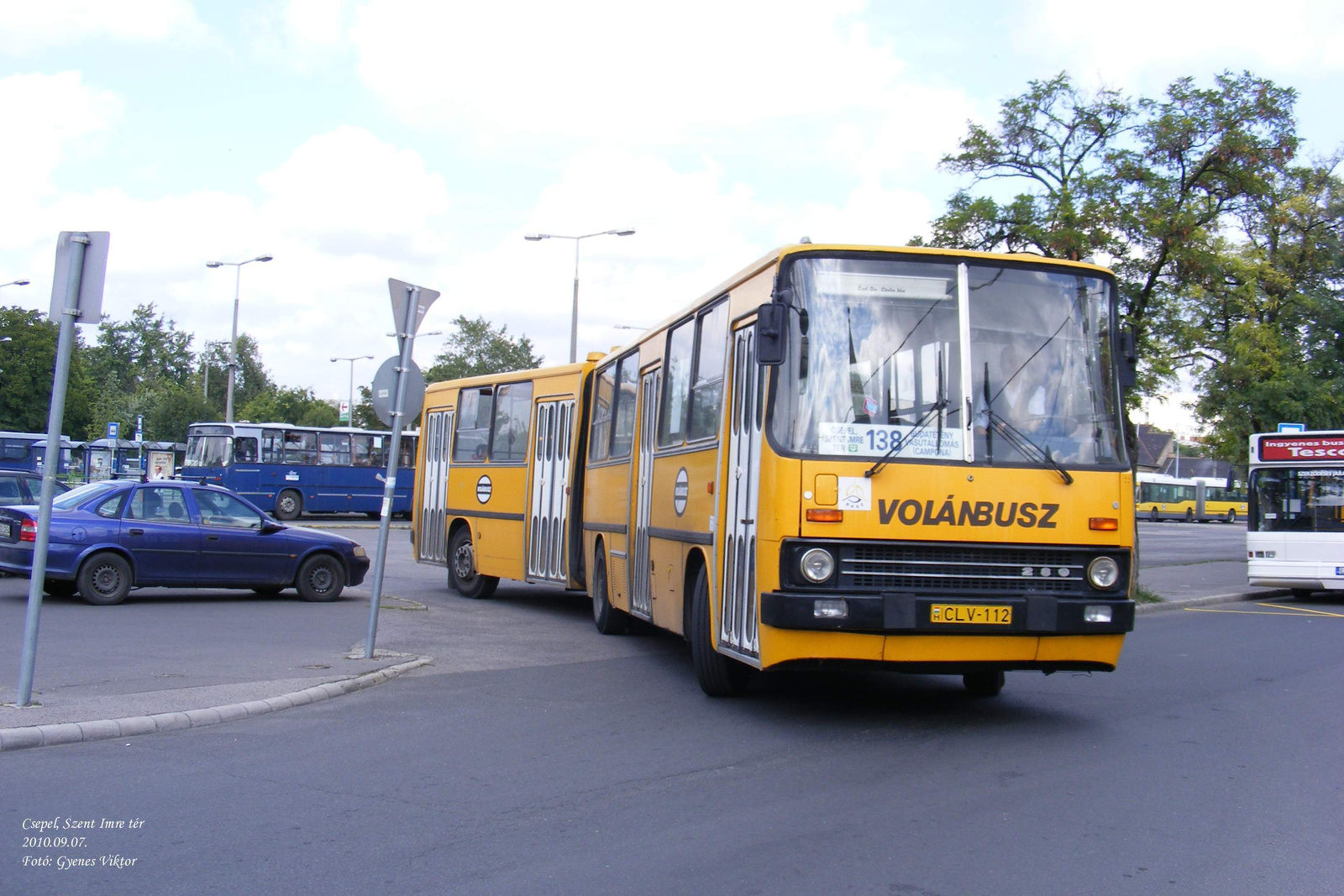 138-as jelzésű Ikarus 280-as busz a Szent Imre téren